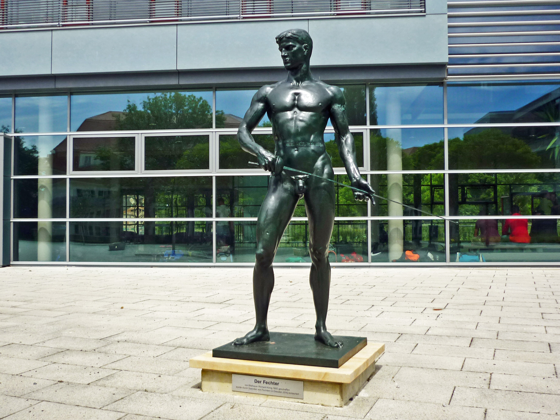 Plastik "Der Fechter" von Richard König (1905) auf dem Hof des Sportgymnasiums in Dresden (restauriert und neu aufgestellt 2014)